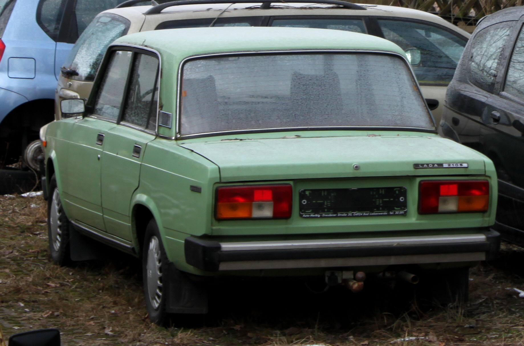 Lada 2105 Rückansicht